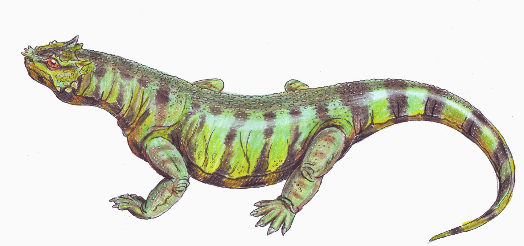 Rhipaeosaurus tricuspidens